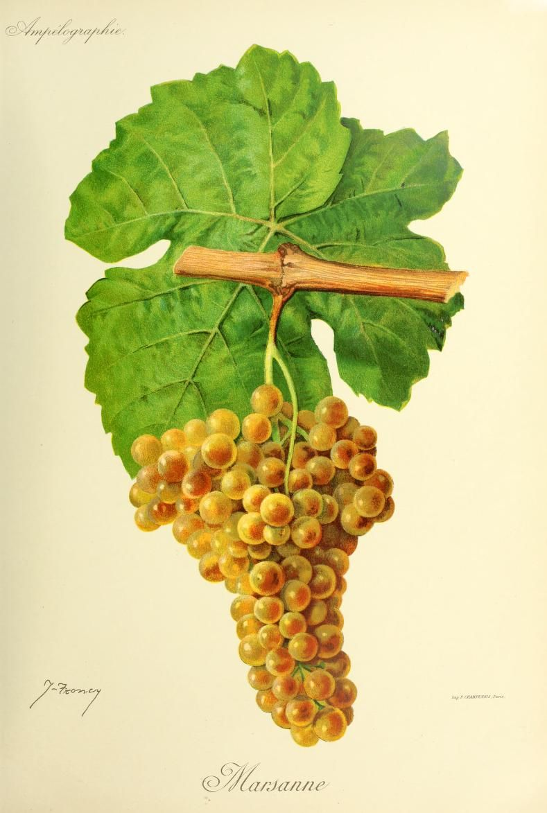 Illustration du cépage Marsanne par Jules Troncy dans l'ouvrage "Ampélographie : traité général de viticulture" publié sous la direction de P. Viala & V. Vermorel avec la collaboration de A. Bacon, A. Barbier, A. Berget [et al.] - Date de l'édition originale : 1901-1910